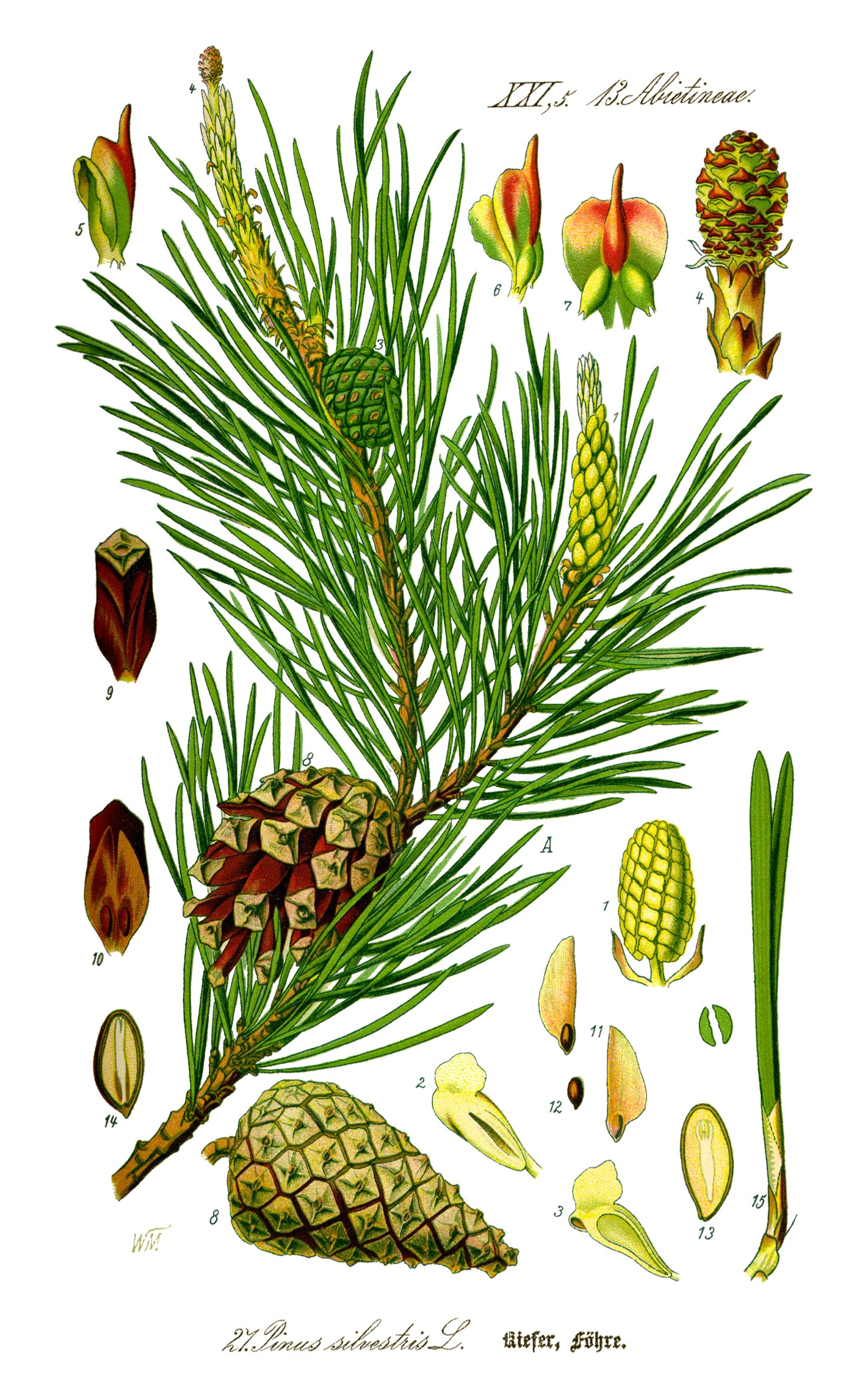 Name:Pinus sylvestris; Family:Pinaceae Original image description (German language): A Zweig mit Blüten und Frucht; 1 männliche Blüte während der Verstäubung; 2 und 3 Staubgefässe vor und nach der Verstäubung; 4 weiblicher Blütenstand; 5 und 6 die Fruchtschuppe in der Achsel der kleineren (links stehenden) Deckschuppe; 7 Fruchtschuppe von vorn, mit den beiden abwärts gerichteten Samenanlagen; 8 reife Zapfen, a geschlossen, b aufgesprungen; 9 einzelne Zapfenschuppe mit dem vierseitigen Schildchen ; 10 dieselbe von innen, um die beiden Samen zu zeigen; 11 geflügelter Same; 12 Same, daneben der von ihm losgelöste Flügel; 13 und 14 ohne, bez. mit der Samenschale der Länge nach durchschnittener Same; der mit mehreren Keimblättern versehene Keim liegt in der Mitte des Eiweisses; 15 Kurztrieb mit 2 Nadeln, nebst Querschnitt der Nadeln. A, 8, 9, 10, 11 und 12 natürl. Grösse, das andere vergrössert. Original book source: Prof. Dr. Otto Wilhelm Thomé Flora von Deutschland, Österreich und der Schweiz 1885, Gera, Germany Permission granted to use under GFDL by Kurt Stueber